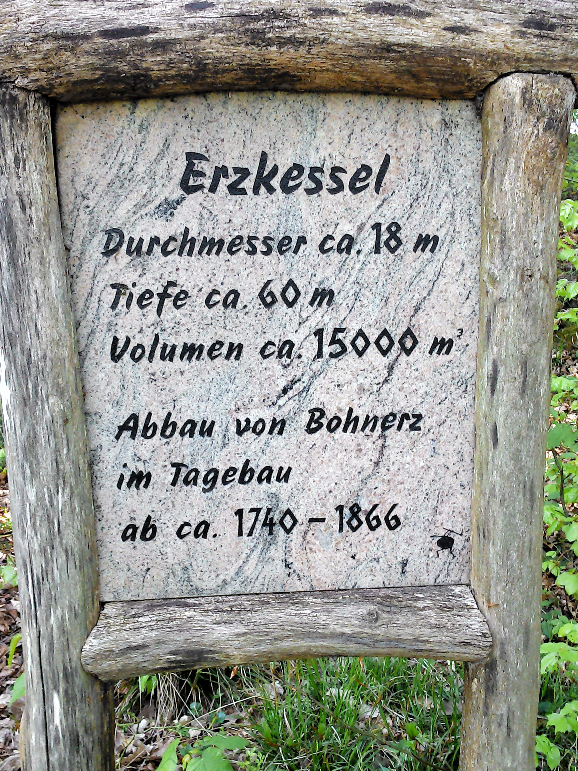 Der Erzkessel bei Küßnach, Gemeinde Küssaberg in Baden-Württemberg. Infotafel oberhalb des Trichters.